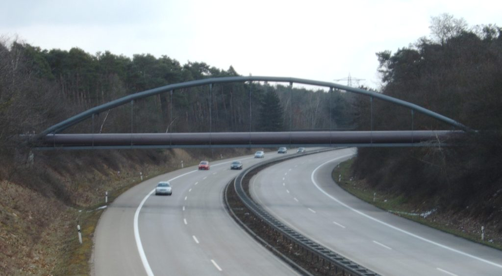 Fernwärmeleitung über B36 in Mannheim, Deutschland